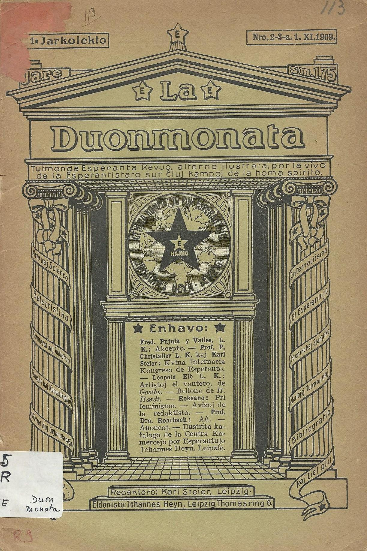 Kovrilo de "La Duonmonata"